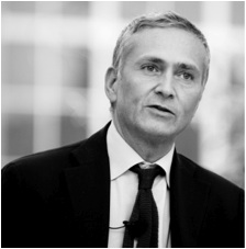 Angelo Miglietta